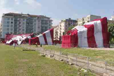 Lo Stadio Filadelfia, ripulito dalle erbacce, poco prima della partita tifosi-vecchie glorie, giocata in occasione del 46.mo anniversario della scomparsa del Grande Torino. I moncherini delle tribune sono state ricoperte da stoffe e bandiere bianche e granata, con un risultato che ricorda l'artista bulgaro Khristo